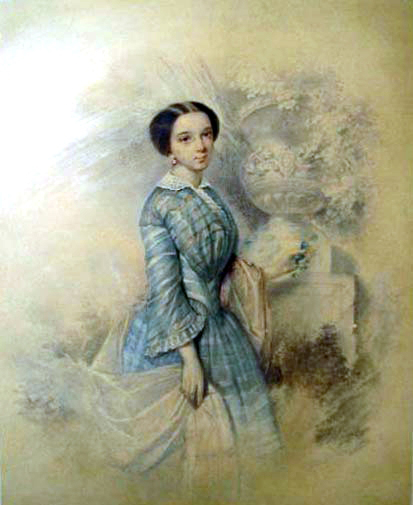 Мария Андреевна Салиас де Турнемир (1838/1842—1906), дочь графа Андре-Генри Салиас де Турнемир и Елизаветы Васильевны Сухово-Кобылиной, известной писательницы (Евгении Тур), с 1862 года жена Гурко Иосифа Владимирович.